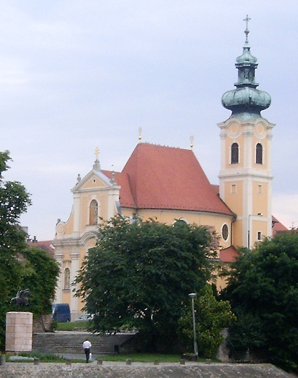 A karmelita templom Győrött a Rába parton, saját kép